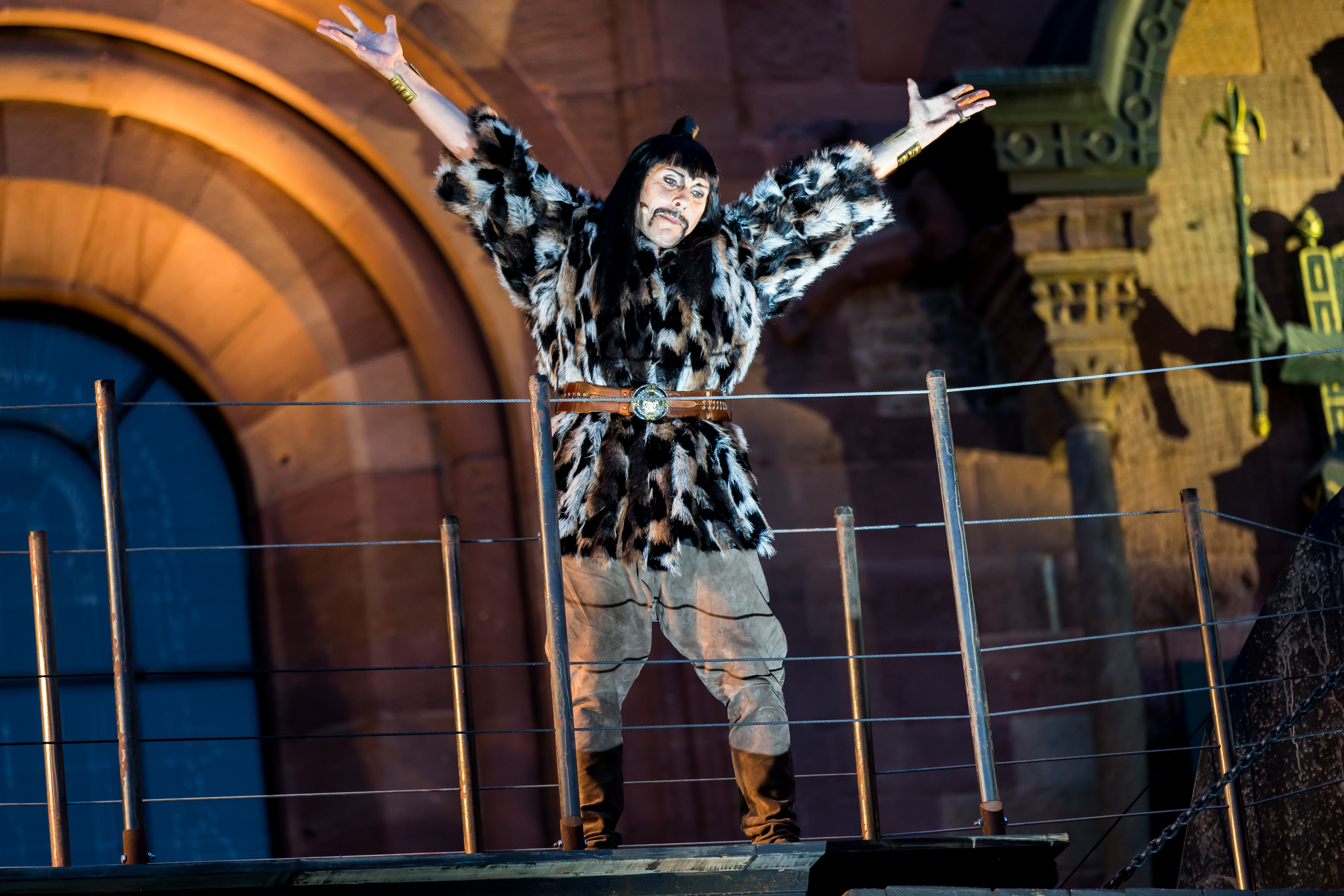 Nibelungenfestspiele Worms Gemetzel 2015 Nordseite Wormser Kaiserdom Nico Hofmann (Intendant), Albert Ostermaier (Autor), Thomas Schadt (Regisseuer) Enemble: Alina Levshin (Ortlieb), Maik Solbach (Narr), Judith Rosmair (Kriemhild), Catrin Striebeck (Brünhild), Markus Boysen (Etzel), Heiko Pinkowski (Dietrich), Max Urlacher (Hagen), Holger Kunkel (Gunter), Gabriel Raab (Gernot), Peter Becker (Giselher), Tom Radisch (Volker), Marion Breckwoldt (Zofe), Radu Cojocariu (Erzähler)